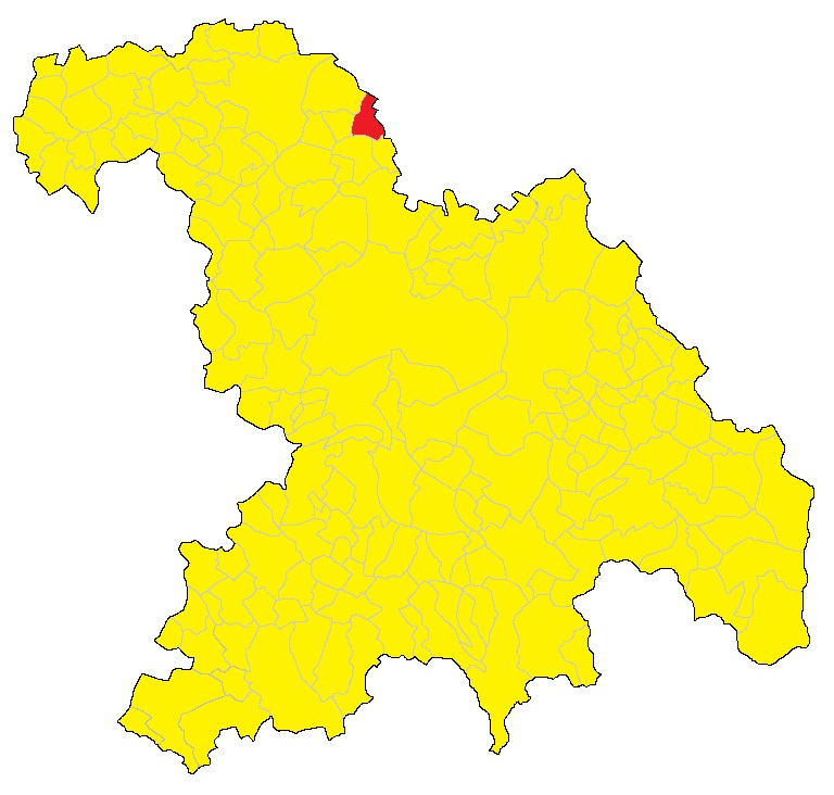 Mappa del comune di Valmacca (AL)